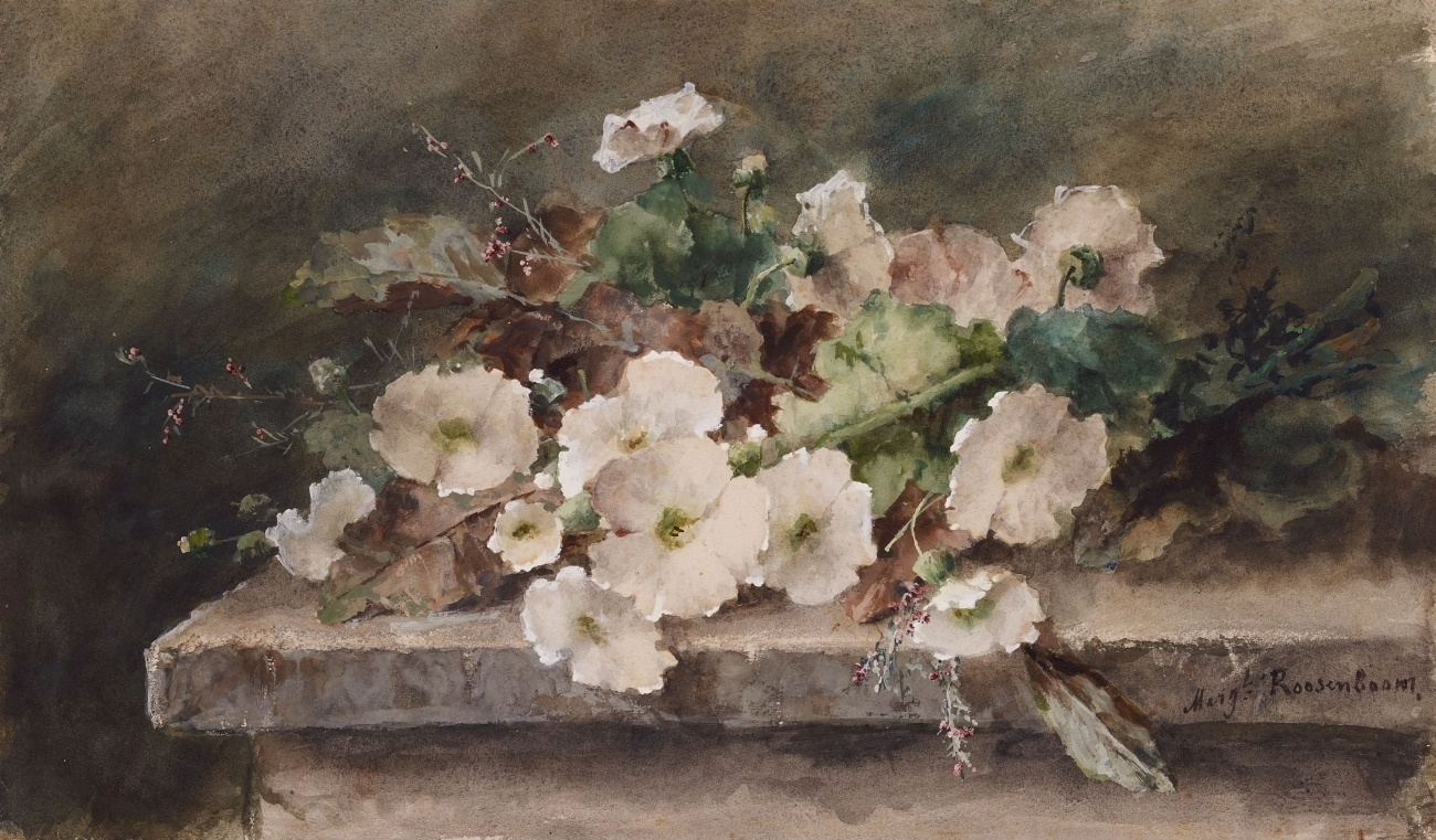 Zweige weißer Malven auf einem Steintisch. Signiert unten rechts: Margt. Roosenboom. Aquarell auf Bütten. 31,5 x 53,5 cm.